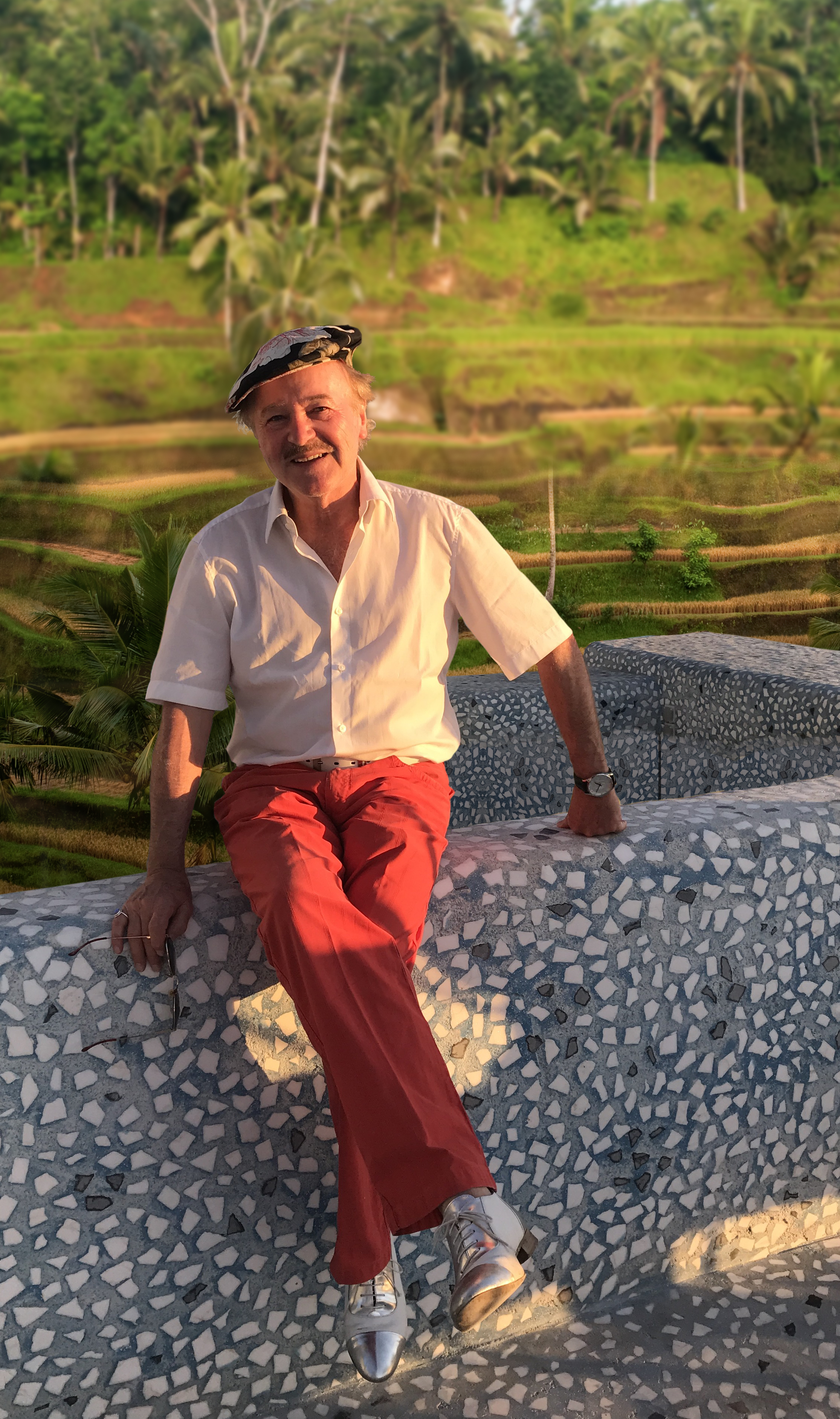 Der Künstler und Weltbürger Helmut Kand